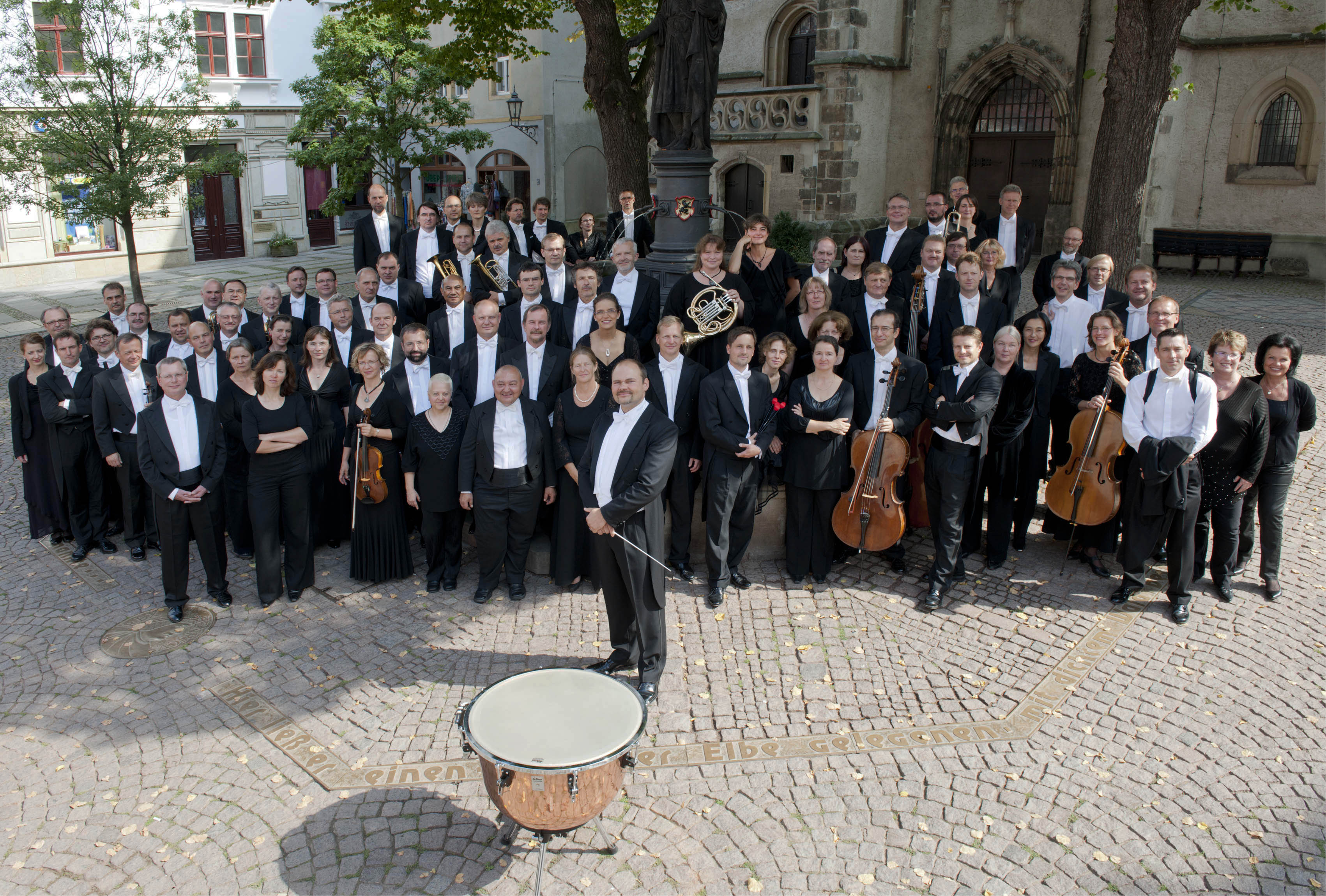 Die Musiker der Elbland Philharmonie Sachsen mit GMD Christian Voß in Meißen.